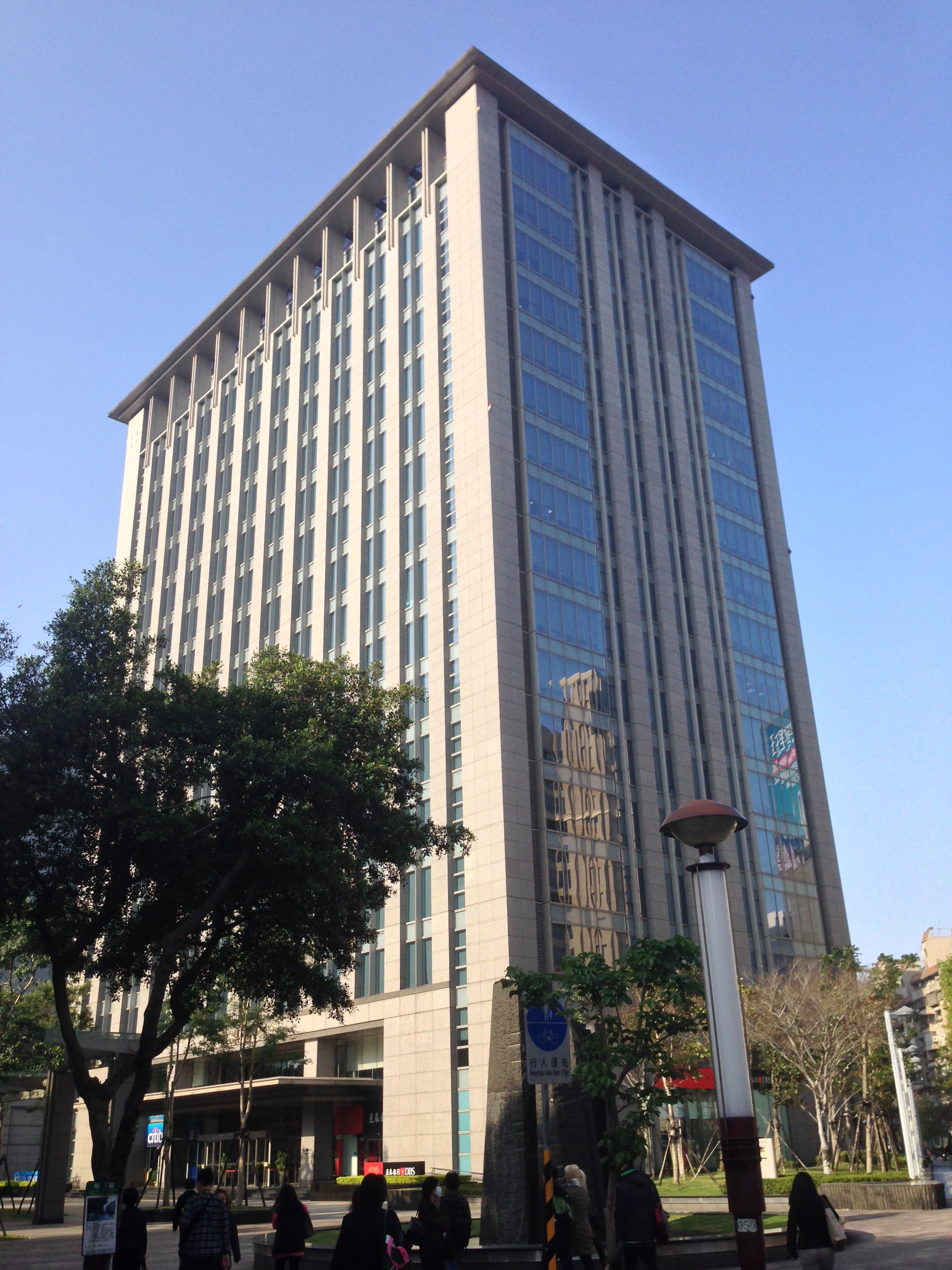 中鼎集團總部大樓，位於臺北市士林區中山北路六段87、89、91號。